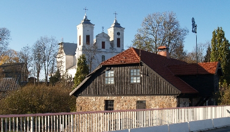 Mosėdis, unikalių akmenų muziejus